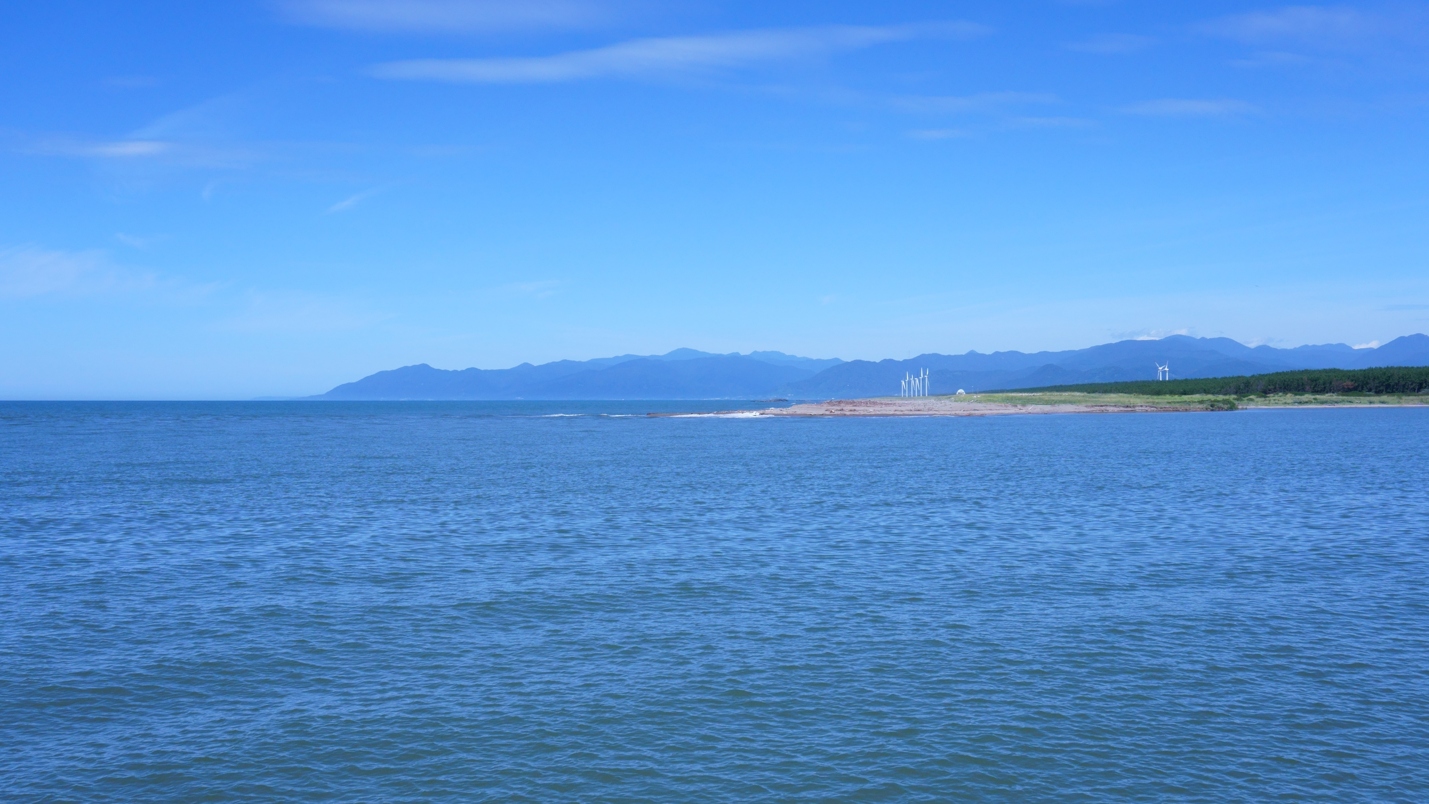 米代川の河口から、対岸の落合浜と白神山地方面を望む。中島釣り公園より撮影